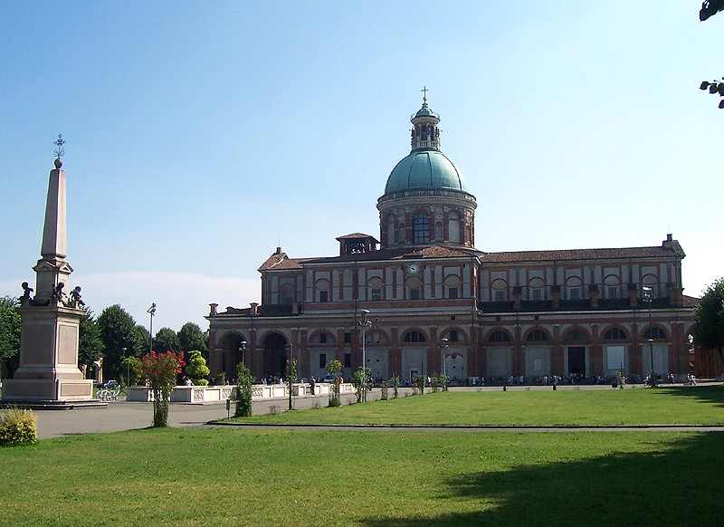 Caravaggio - Santuario della Madonna del Fonte